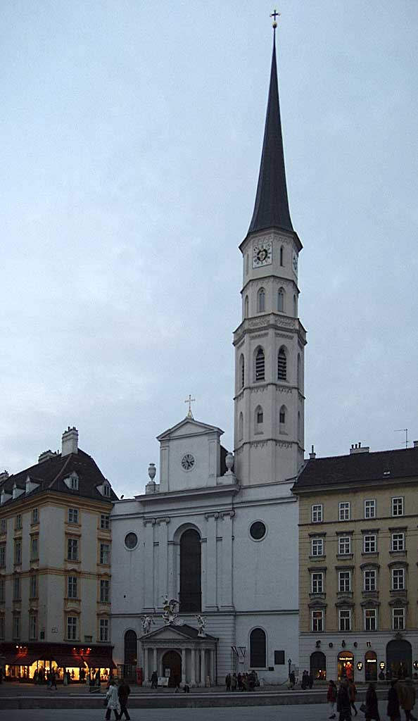 Michaelerkirche in Vienna